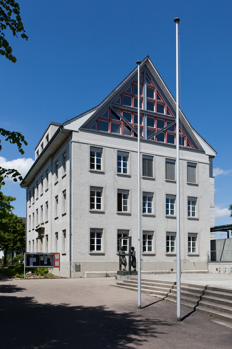 Altes Schulhaus an der Tramstrasse in Suhr (Kulturgut, Liste C)